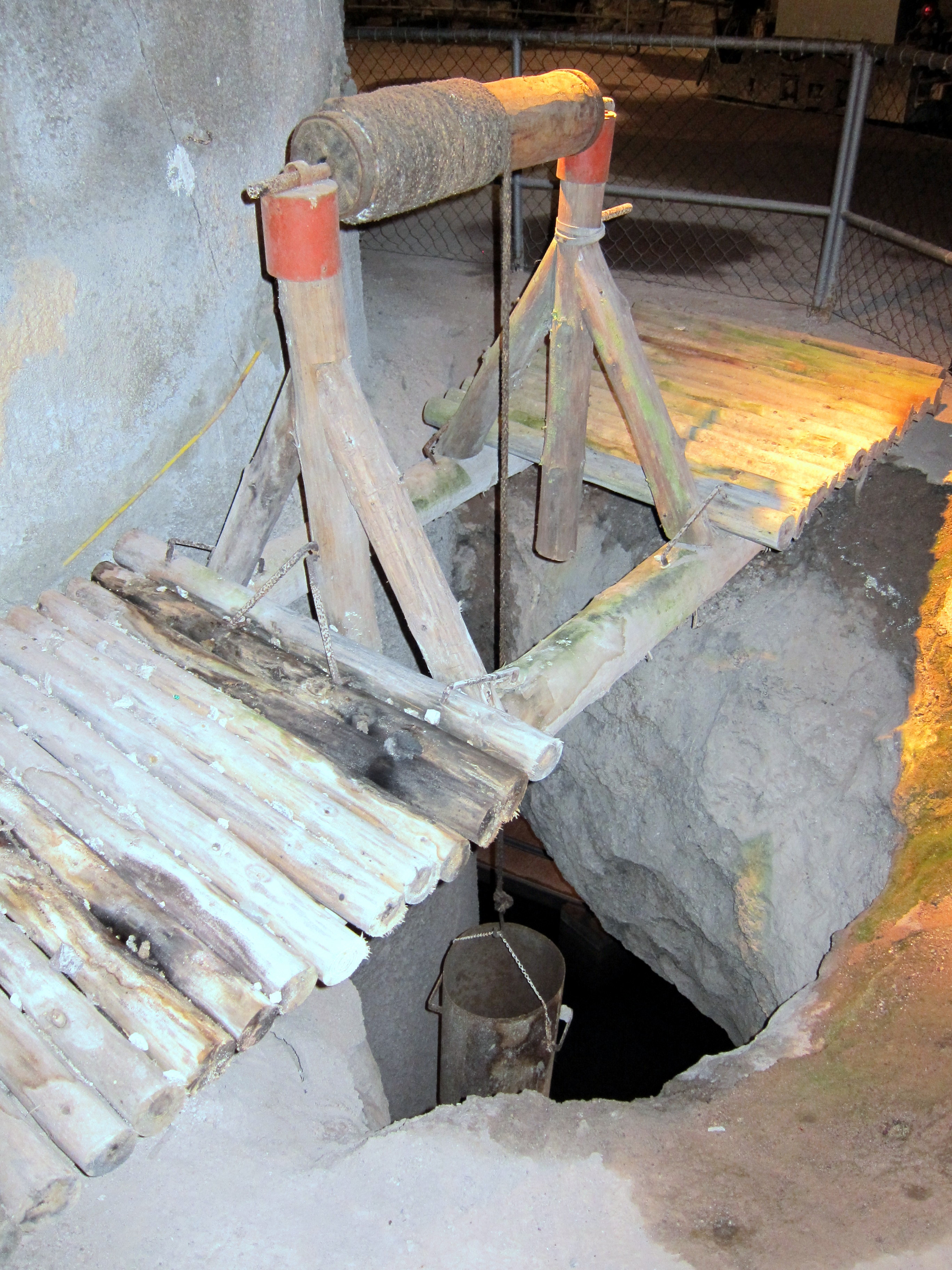 Marienglashöhle